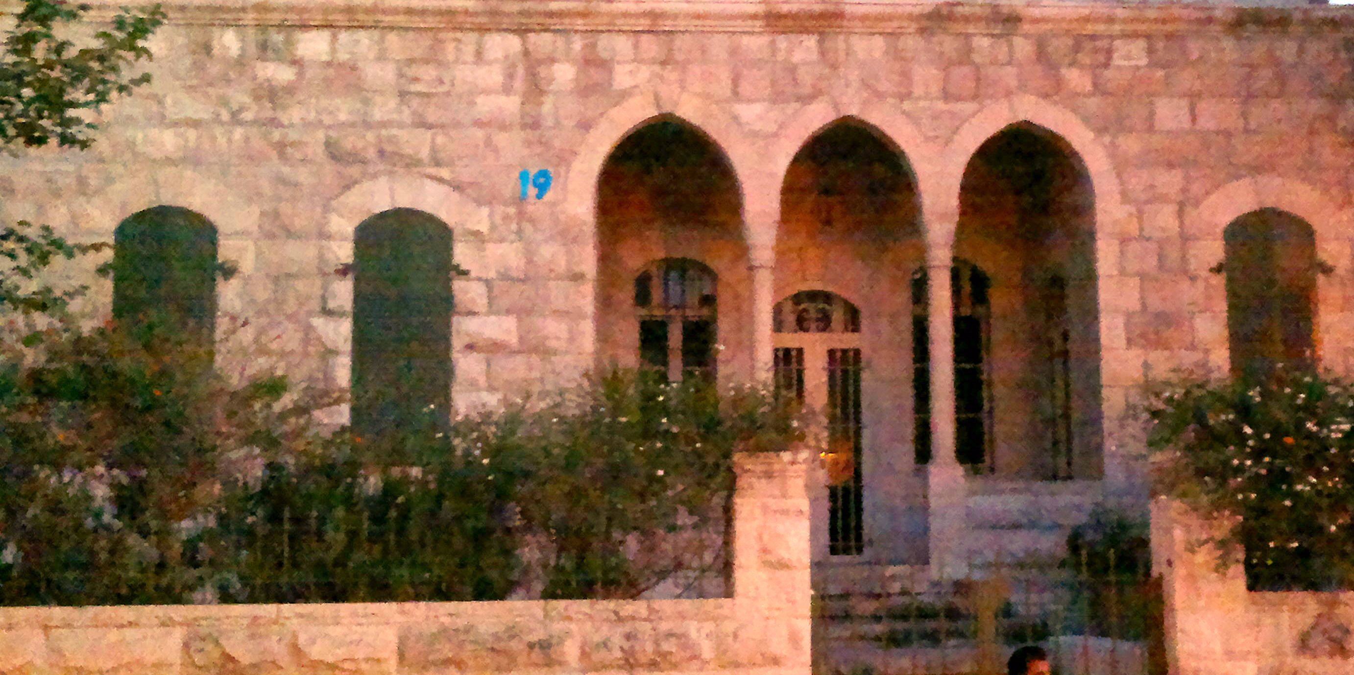 واجهة لبيت عمّاني أثري، عمّان - الأردن.